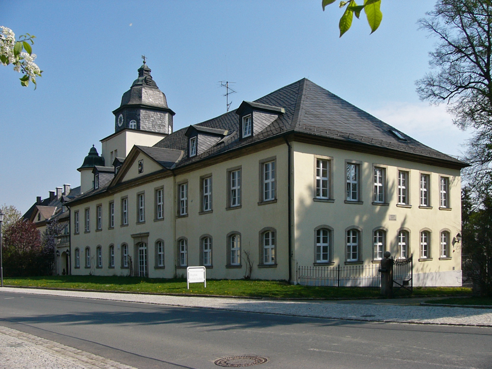 Schloss Zedtwitz